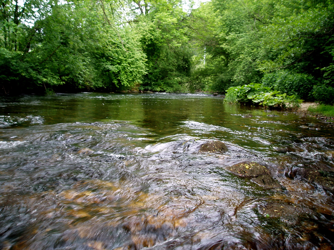 Schüss bei La Heutte. Photo Toni Linder, Evilard, Switzerland